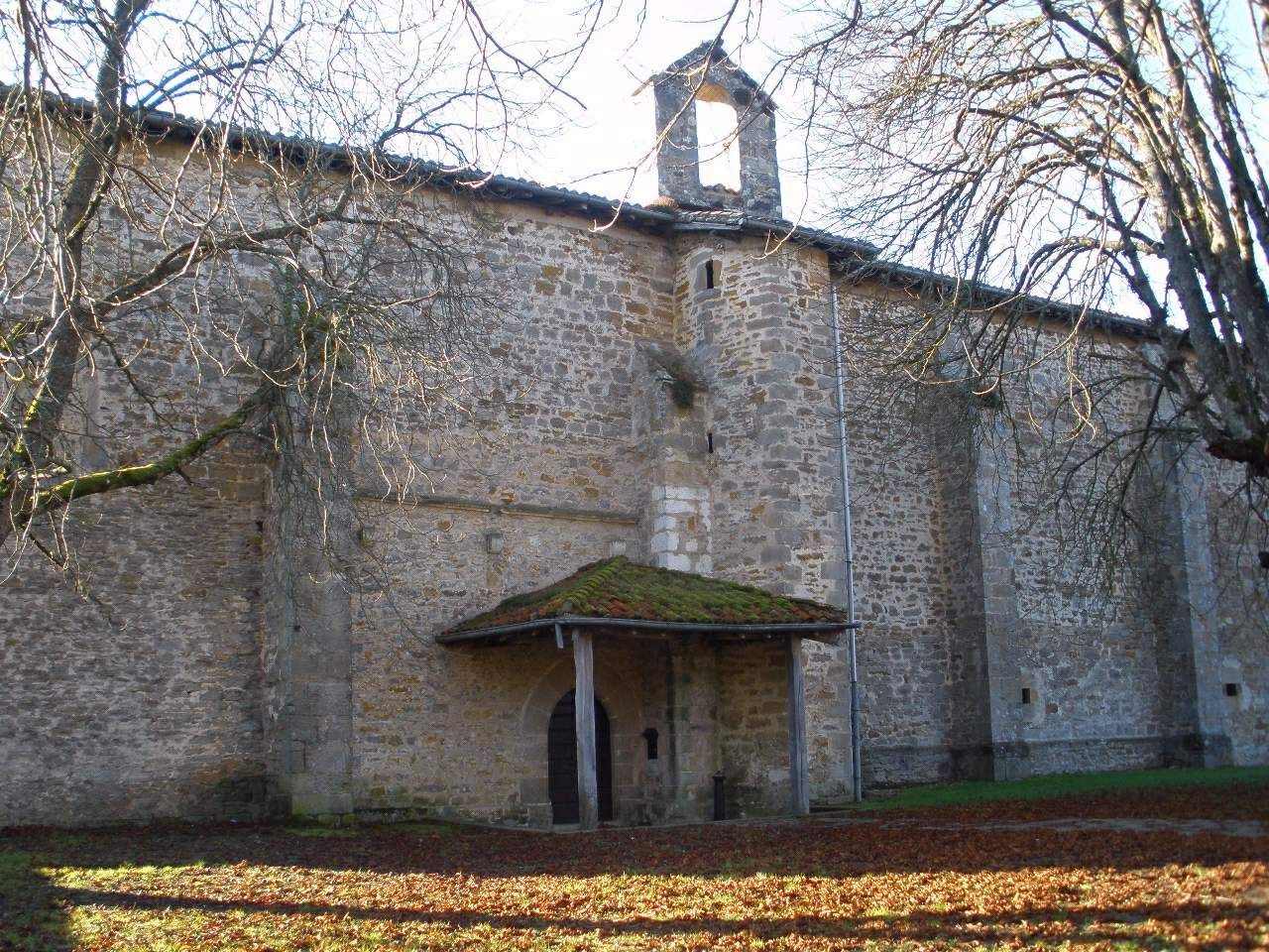 Monasterio cisterciense de Santa María de Barria (Álava)